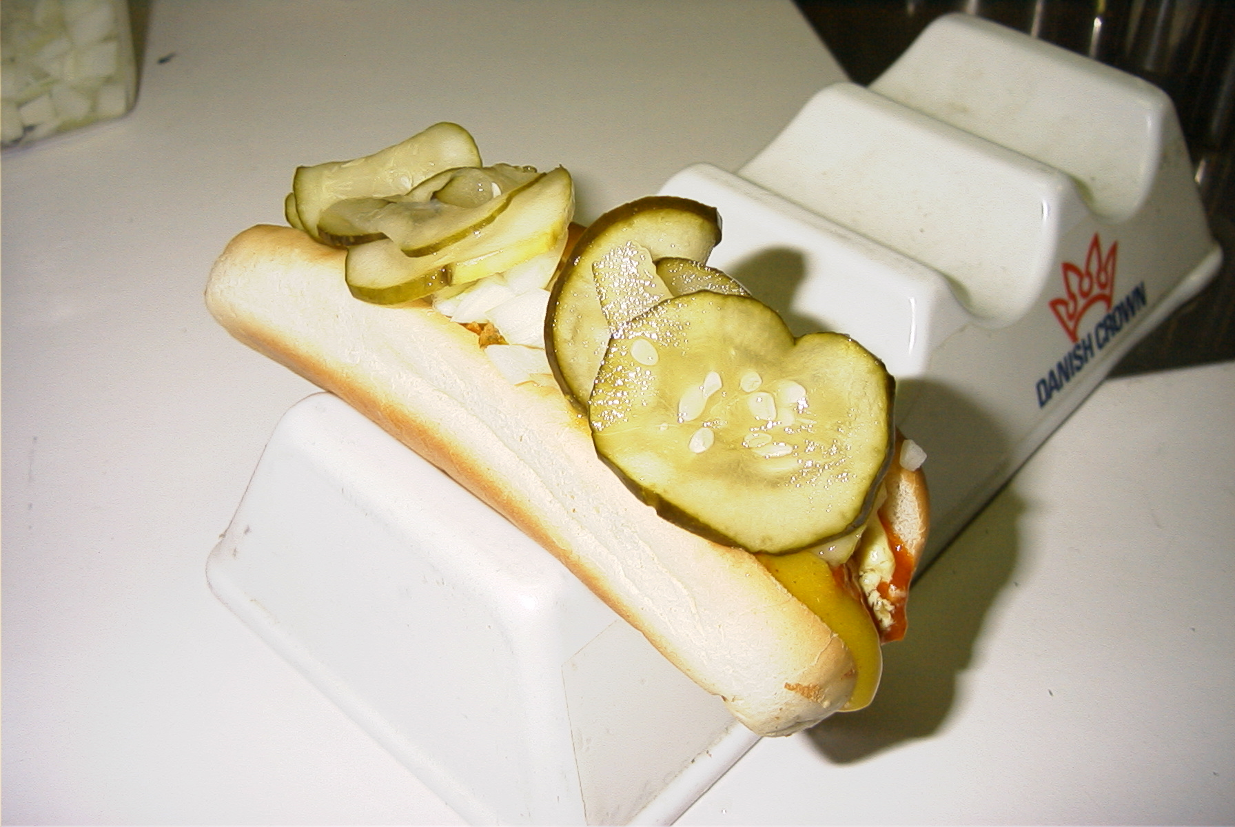 Kradser med ketchup, sennep, fransk sennep, remoulade, ristede løg, rå løg og syltede agurker.